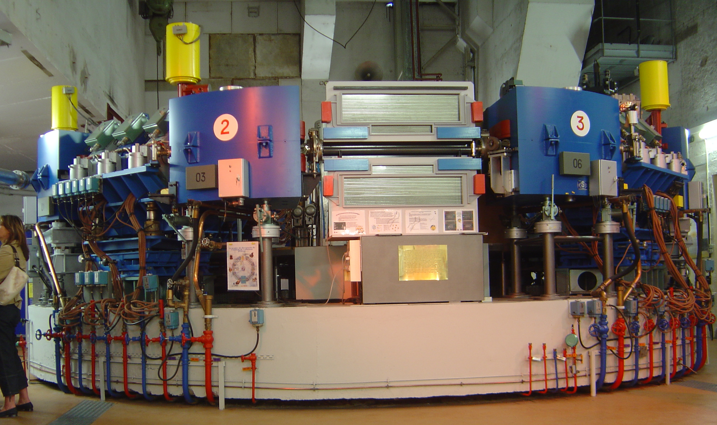 Université Paris-Sud (Orsay), anneau de stockage de particules ACO Journées de la Science 2005